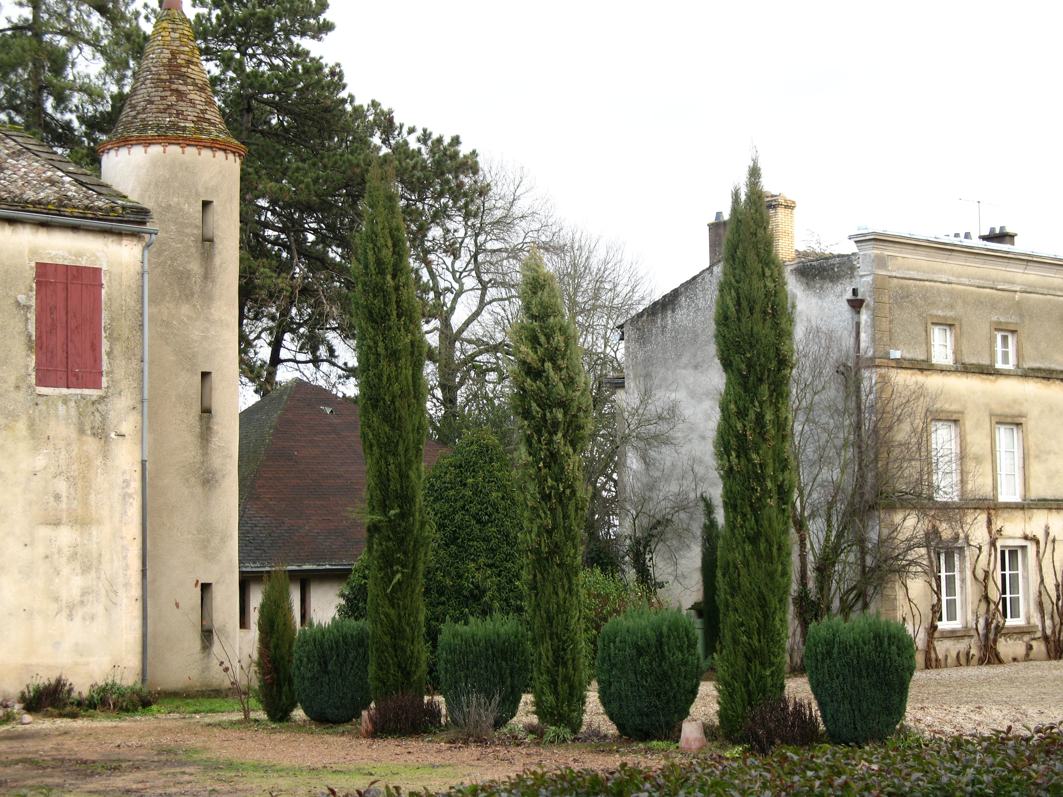 château de l'Arvolot - Boyer (Saône-et-Loire)